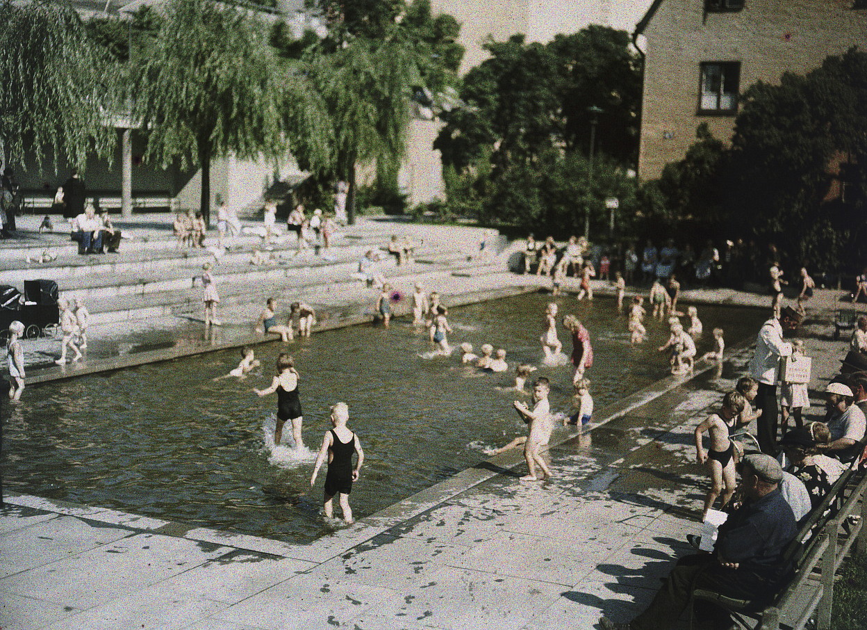 Plaskdammen i Björns Trädgård 1937